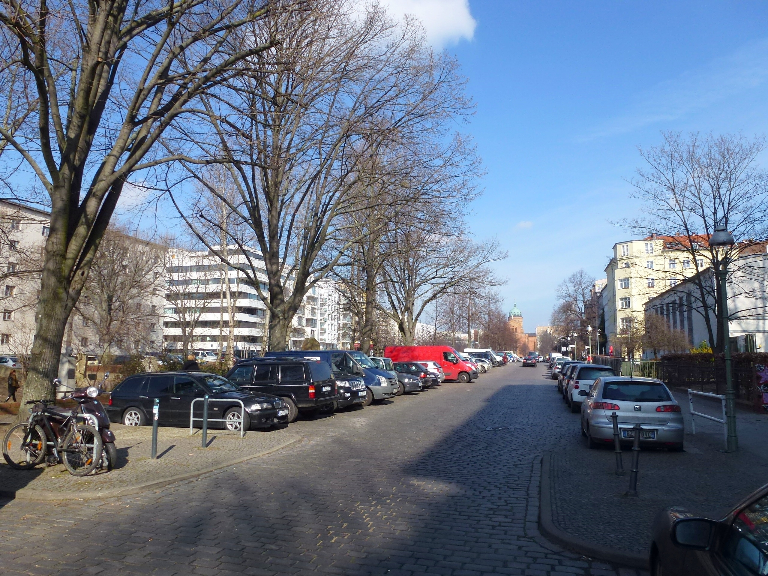 Berlin-Kreuzberg Leuschnerdamm